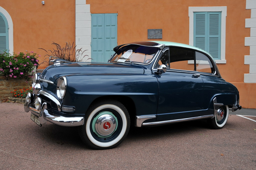 Salon Auto-Moto 2010 Le Bois d’Oingt